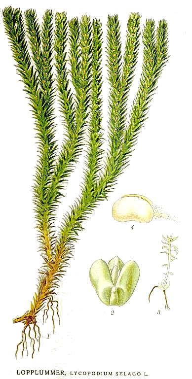 Huperzia selago (L.) Bernh. ex Schrank & Mart. Original Description Lopplummer, Lycopodium selago L.